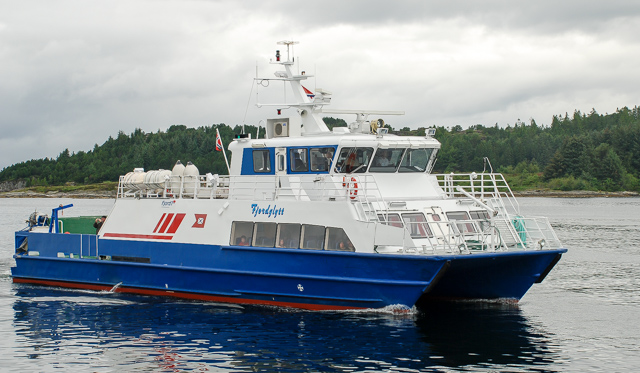 MS Fjordglytt i Florø i 2010